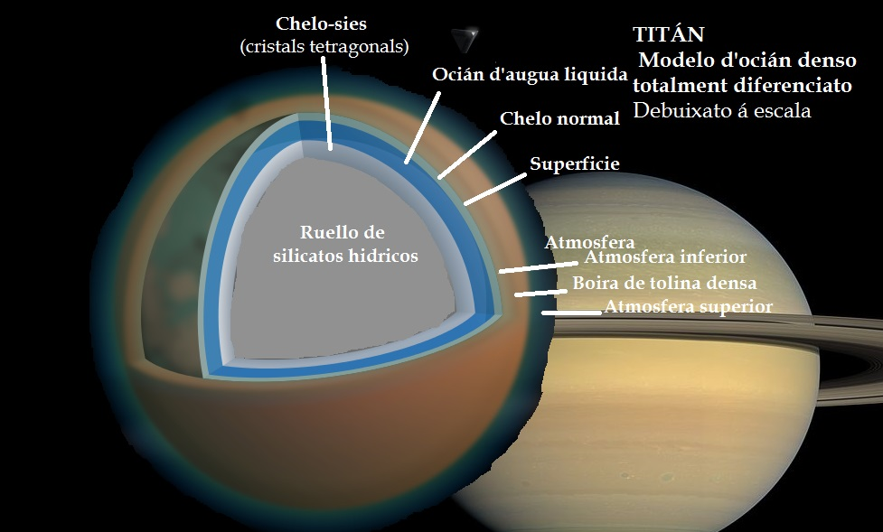 Aragonés: Modelo d'a estructura interna de Titán